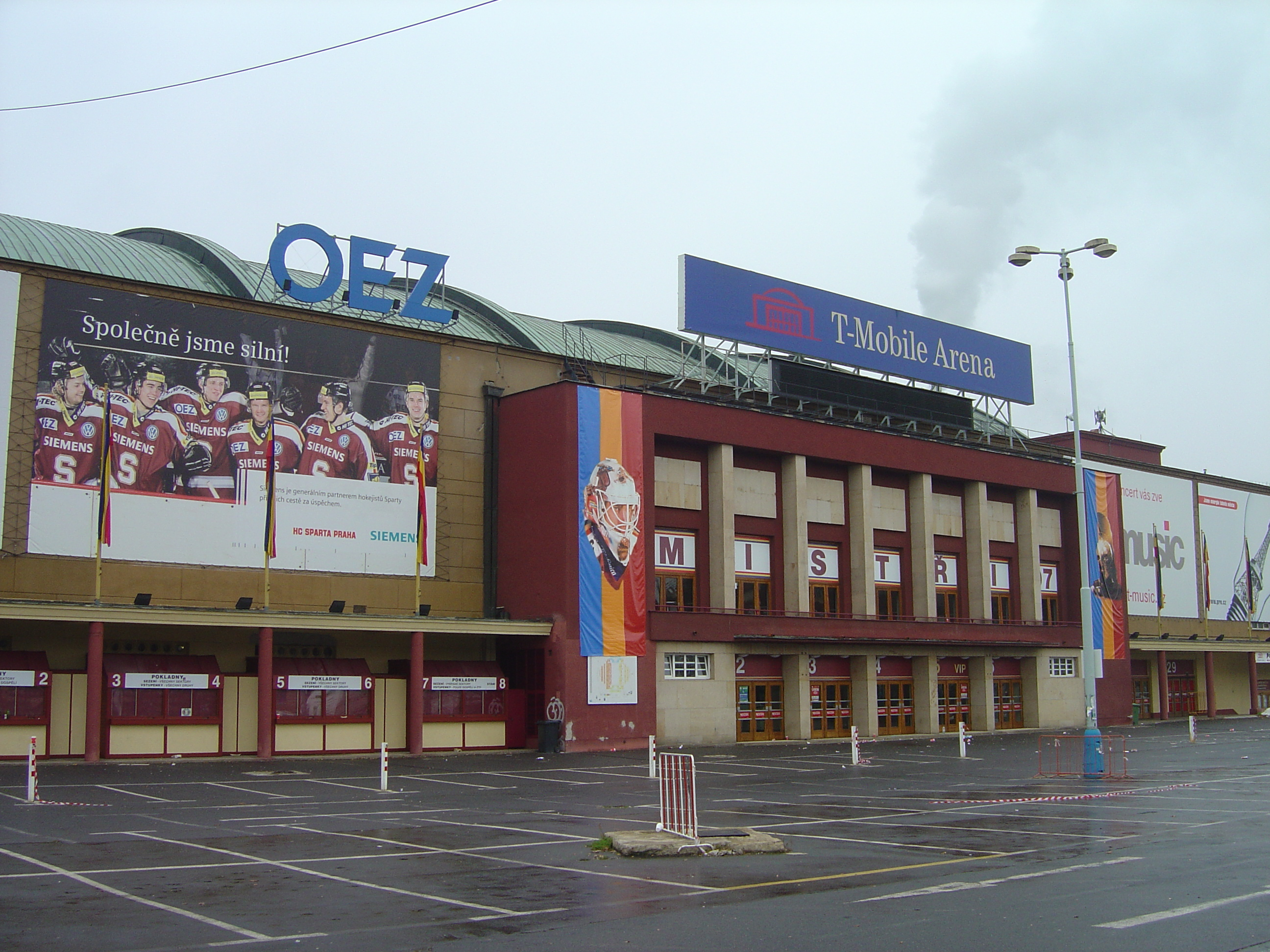 Tesla Arena, Prague, Czech Republic